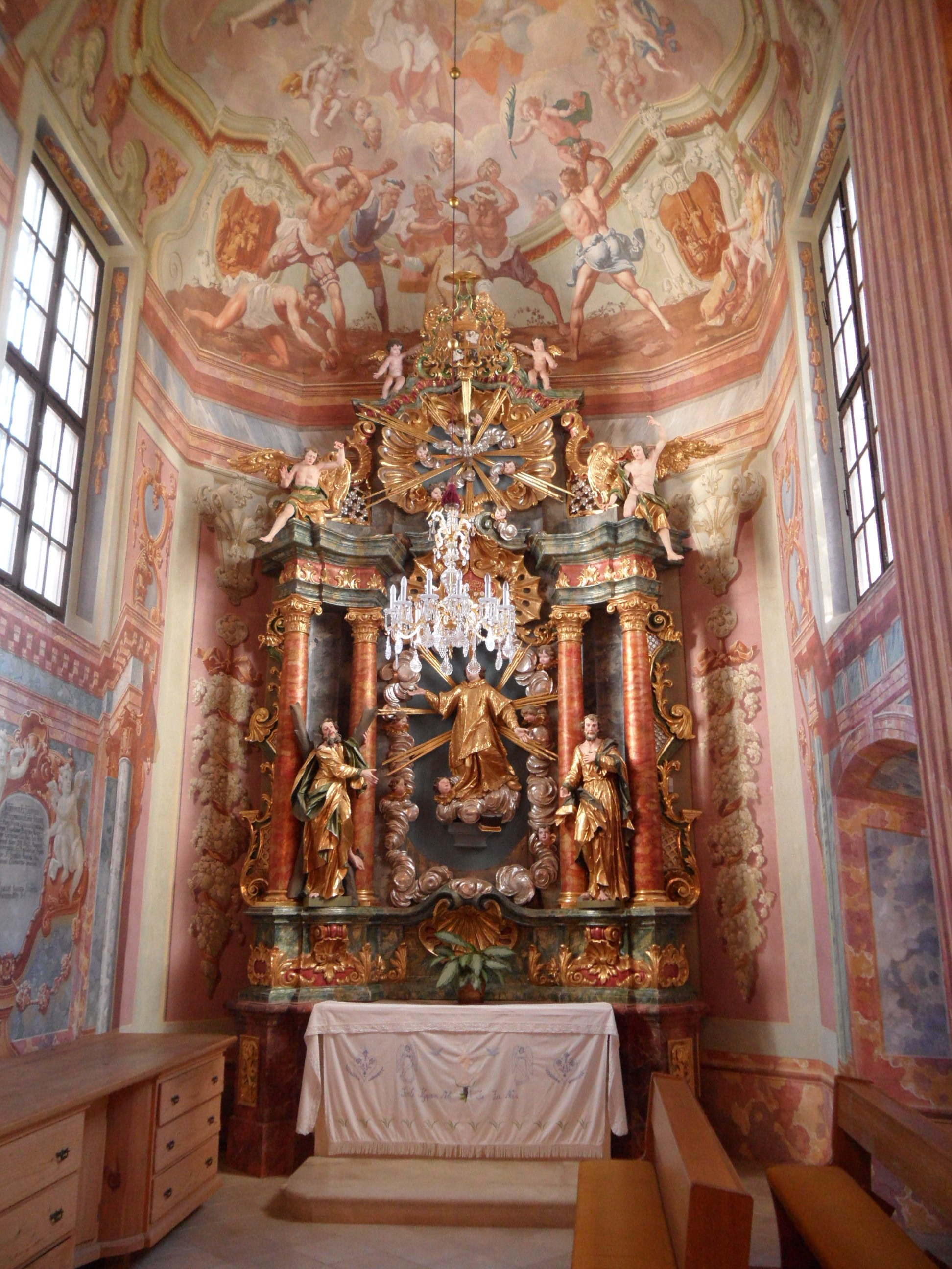 Barokna crkva